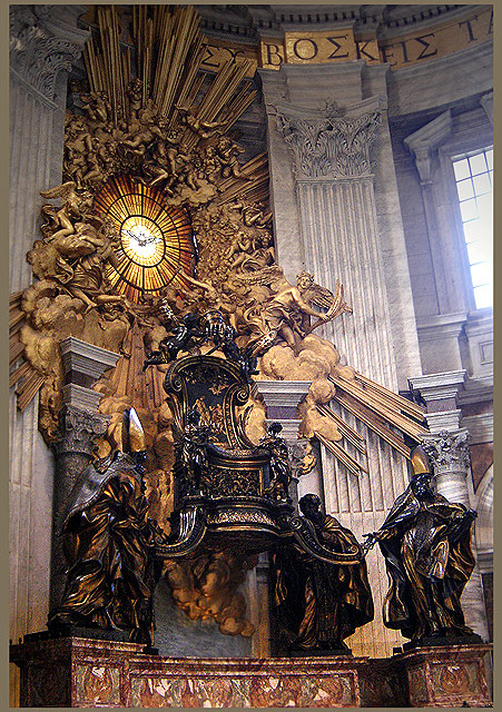 Interior da Basílica de S. Pedro, Vaticano. Cathedra Petri e Gloria, de Bernini